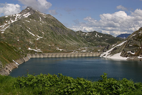 Lago di Lucendro mit Blick zum Hospiz San Gottardo